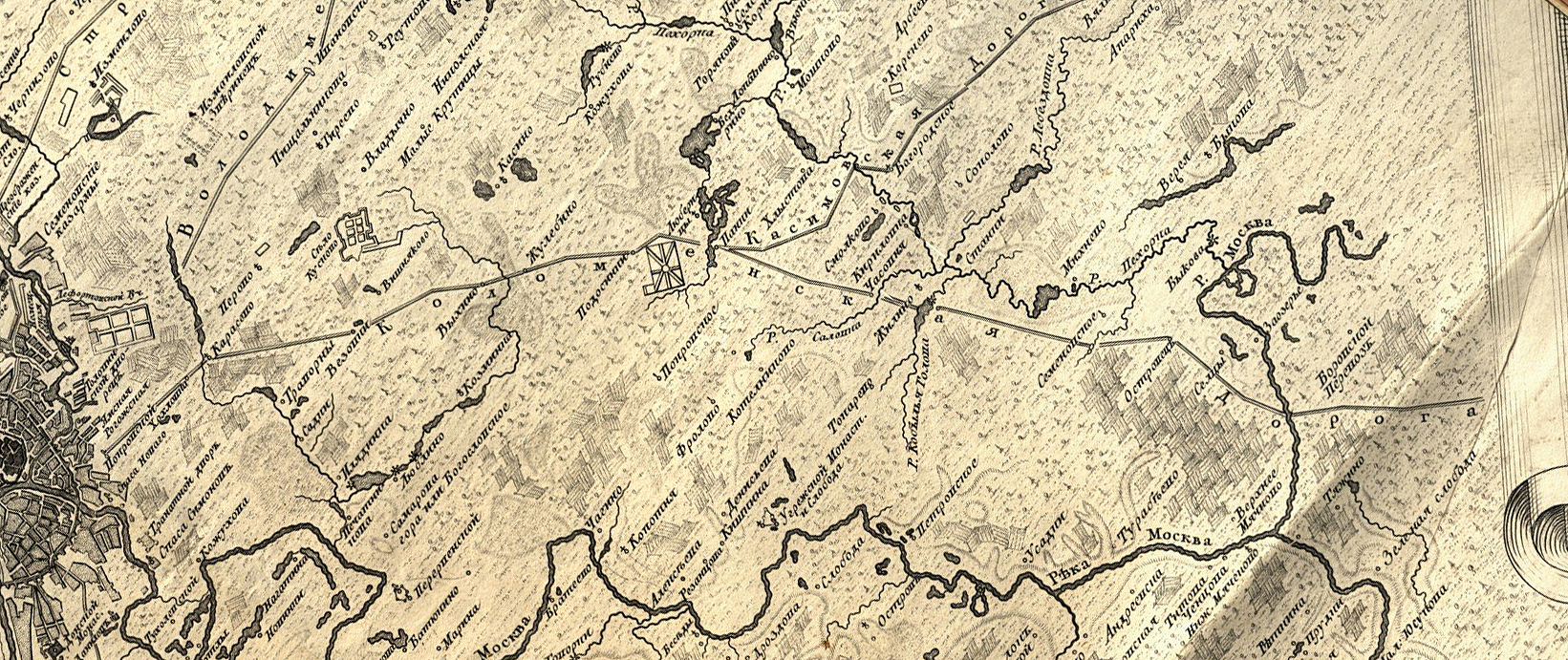 1766 год. План царствующего града Москвы с показанием лежащих мест на 30 верст в округе. Фрагмент. Коломенская дорога.